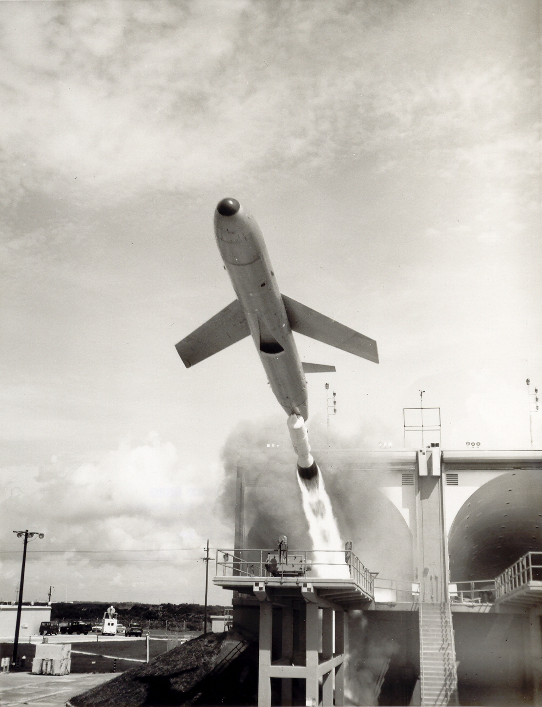 Mace missile